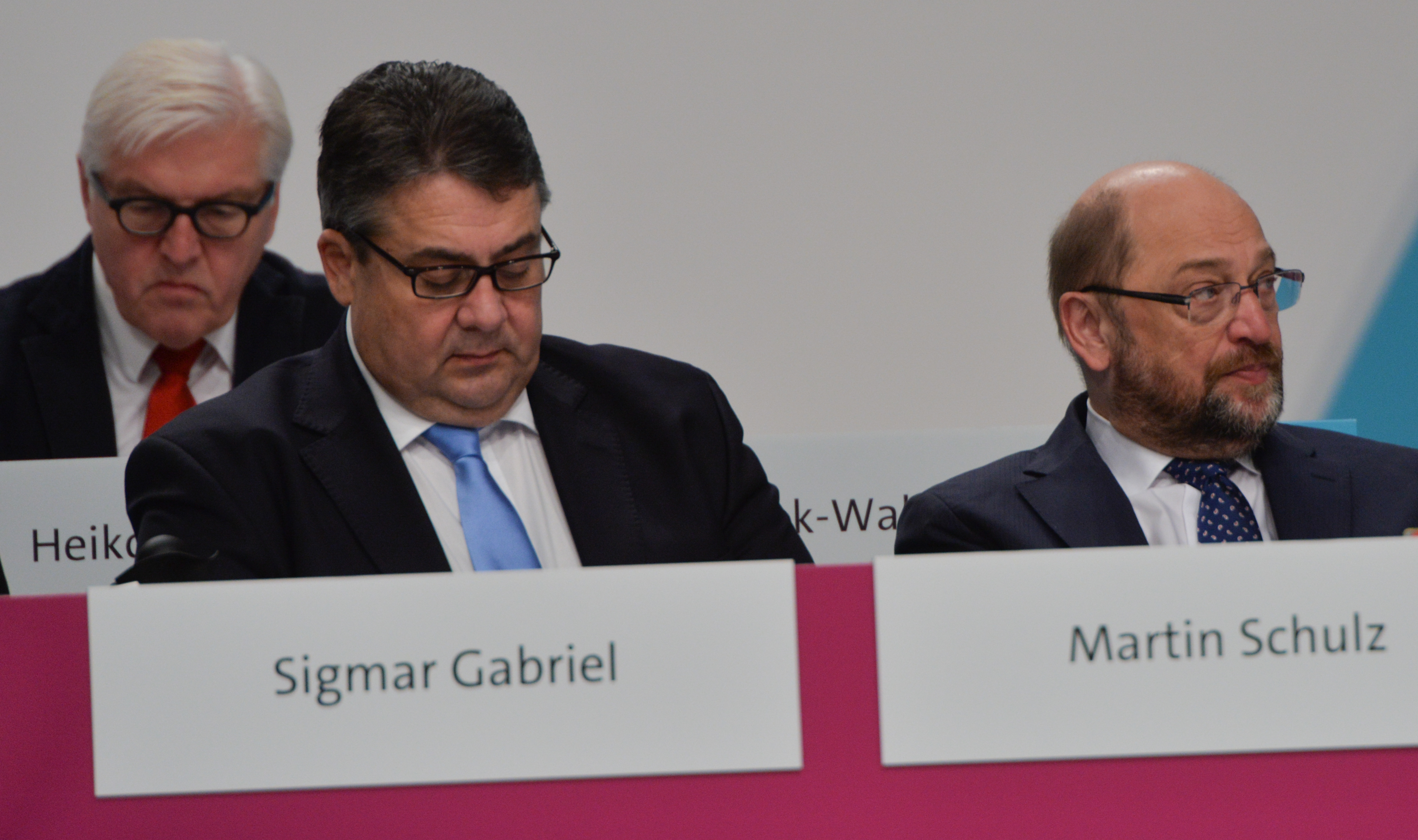 SPD Bundesparteitag 2015 - Gruppenaufnahmen